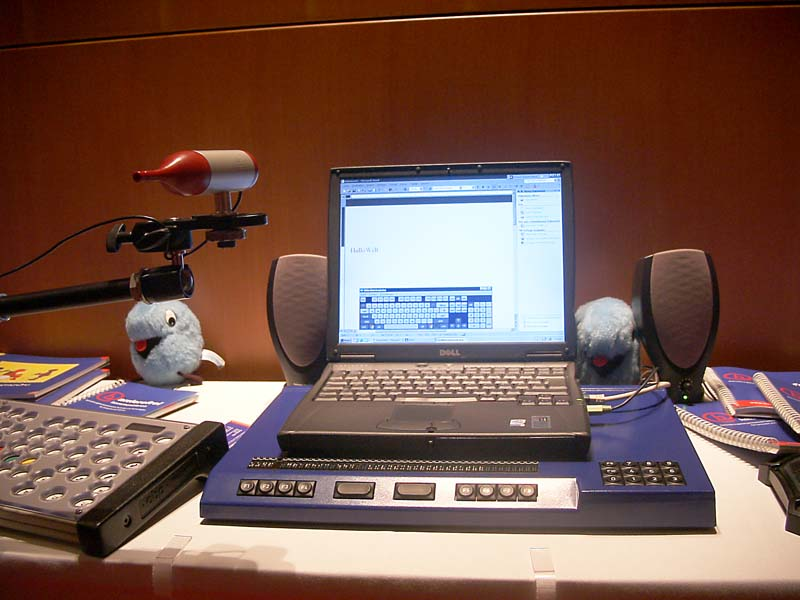 Biene2004-29